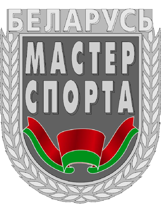 Нагрудны знак адрознення Майстар спорту Рэспублікі Беларусь